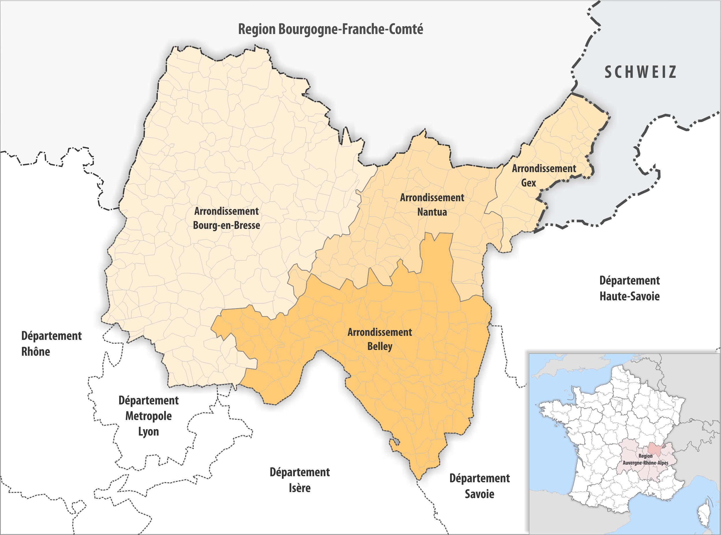 Gemeinden und Arrondissemente im Departement Ain